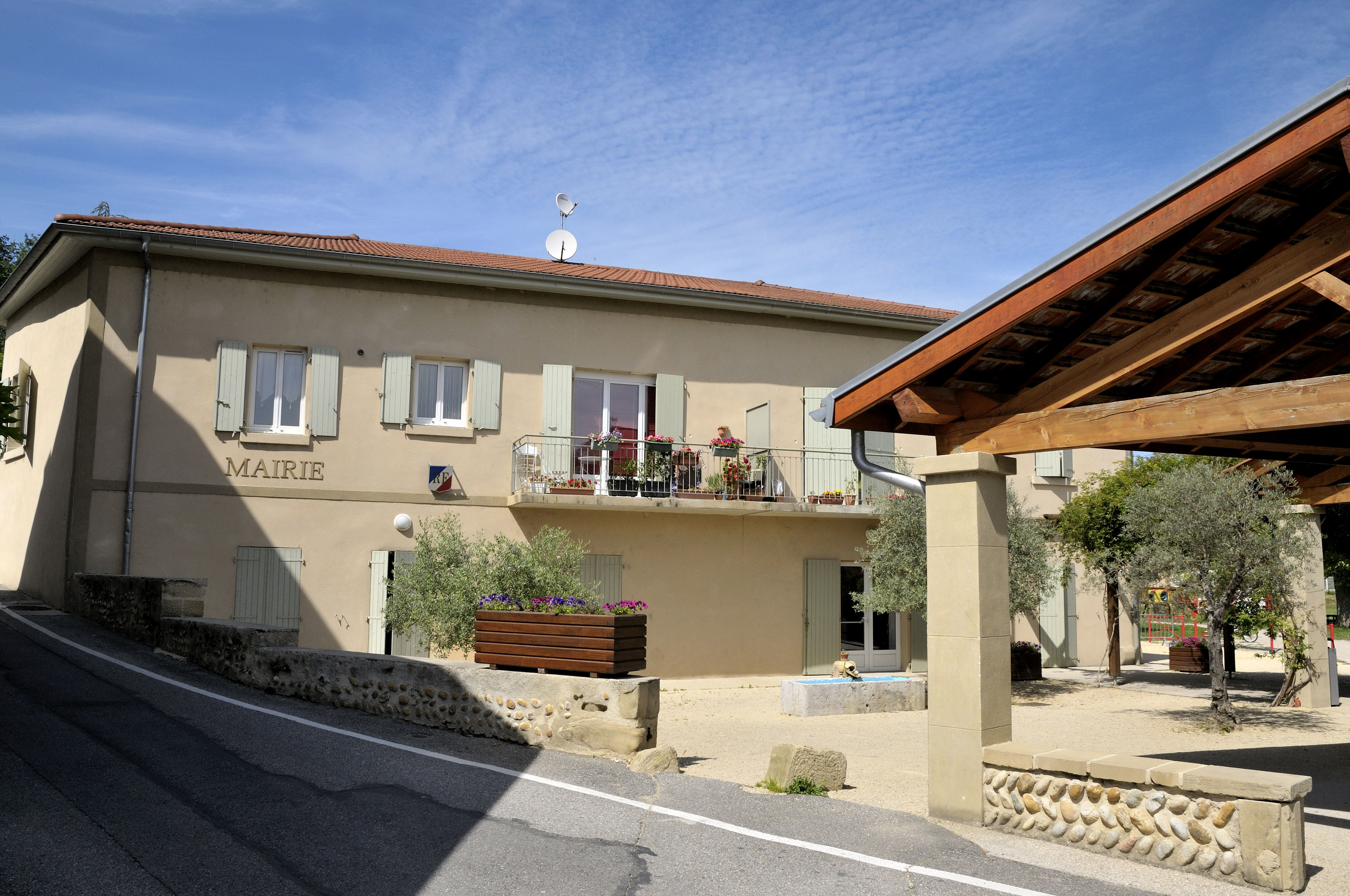 la mairie